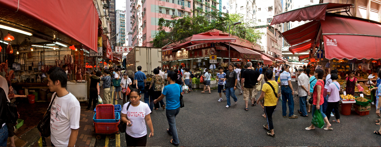 Lebensmittelmarkt Wan Chai